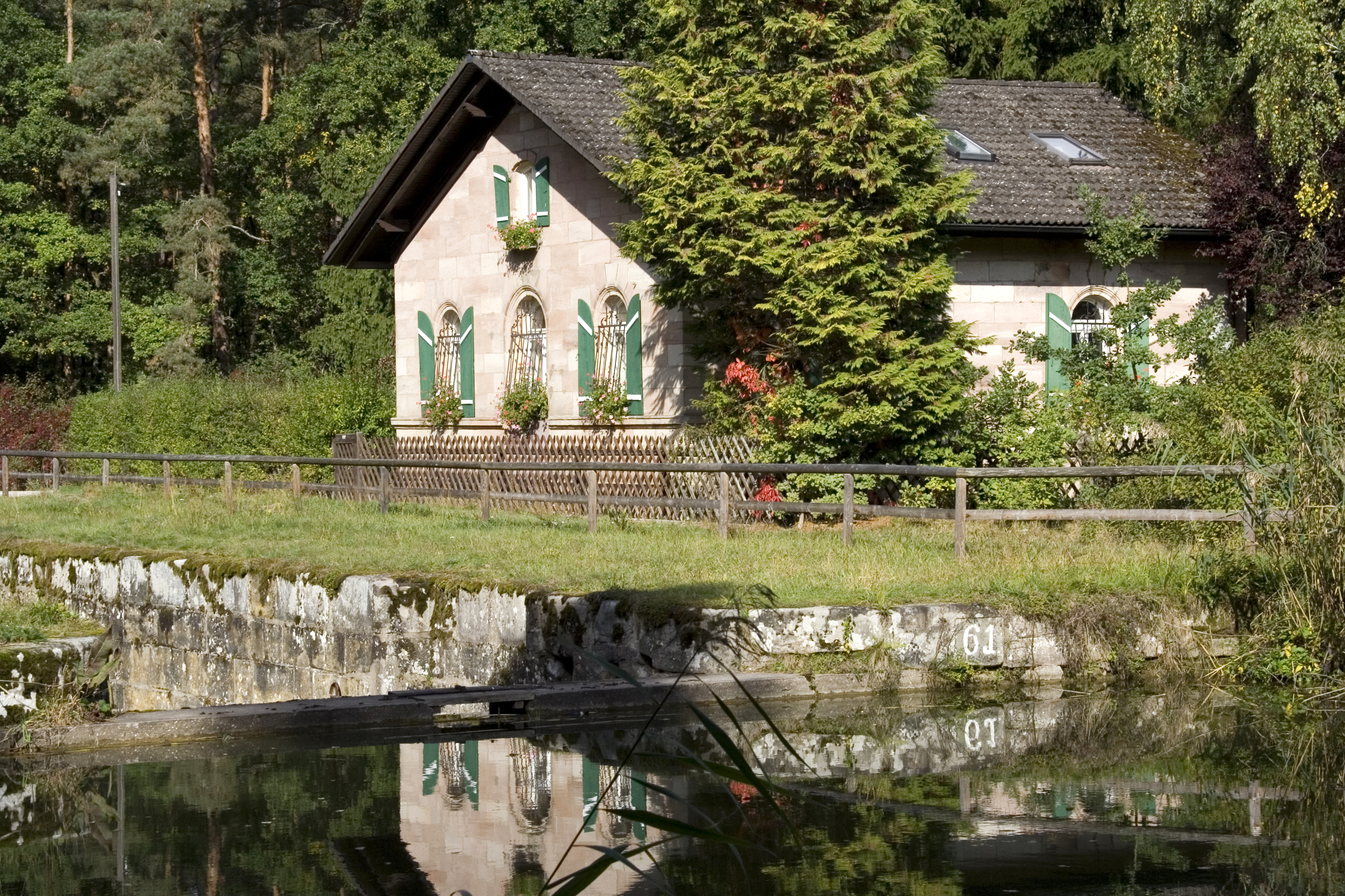 Schleuse 61